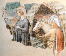 Фрагмент фрески Пьетро да Римини